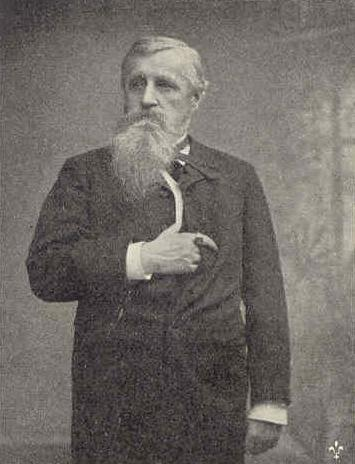 August Schauman, finländsk publicist och politiker, grundare av tidningen Hufvudstadsbladet. Ur "Finland i ord och bild", skriven av O.M. Reuter, utgiven i Stockholm 1901, sidan 99.